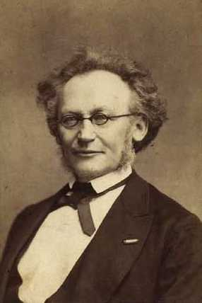 Johannes Japetus Smith Steenstrup (8. marts 1813 - 20. juni 1897), naturforsker.